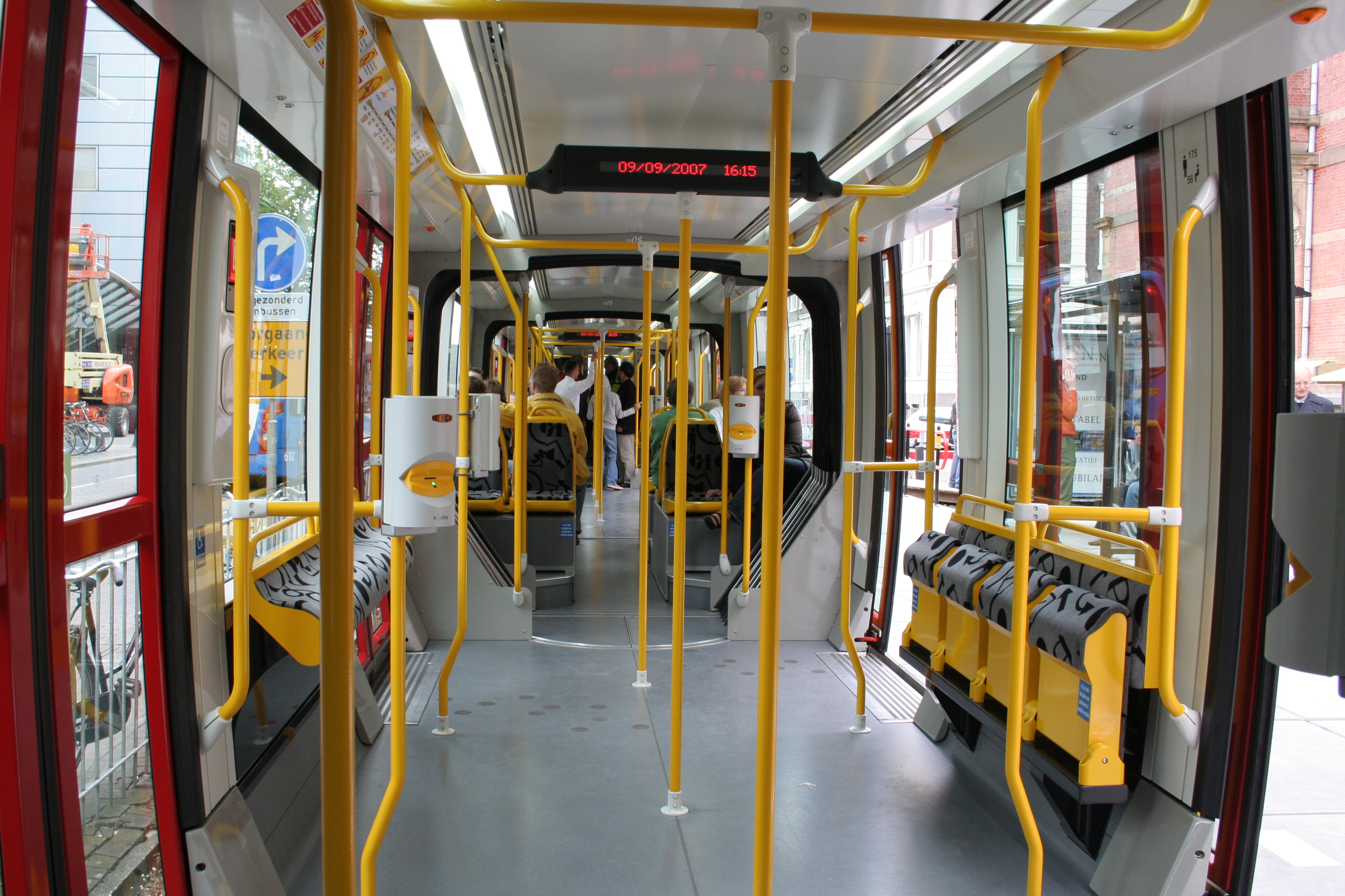 Interieur Tram Mulhouse circulant à Utrecht